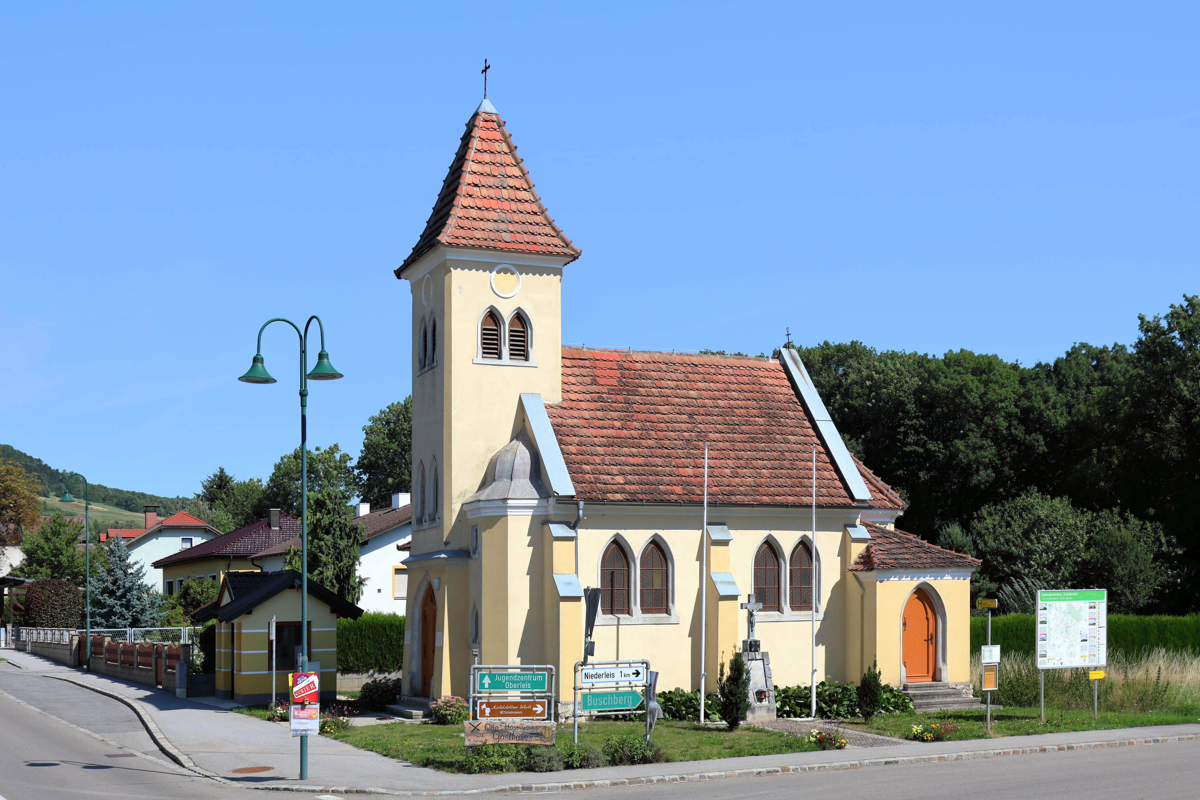 Die der Mutter Gottes geweihte Ortskapelle von Nodendorf, ein Ortsteil der niederösterreichischen Gemeinde Niederleis. Die anstelle einer Holzkapelle errichtete Kapelle wurde am 16. September 1928 geweiht.